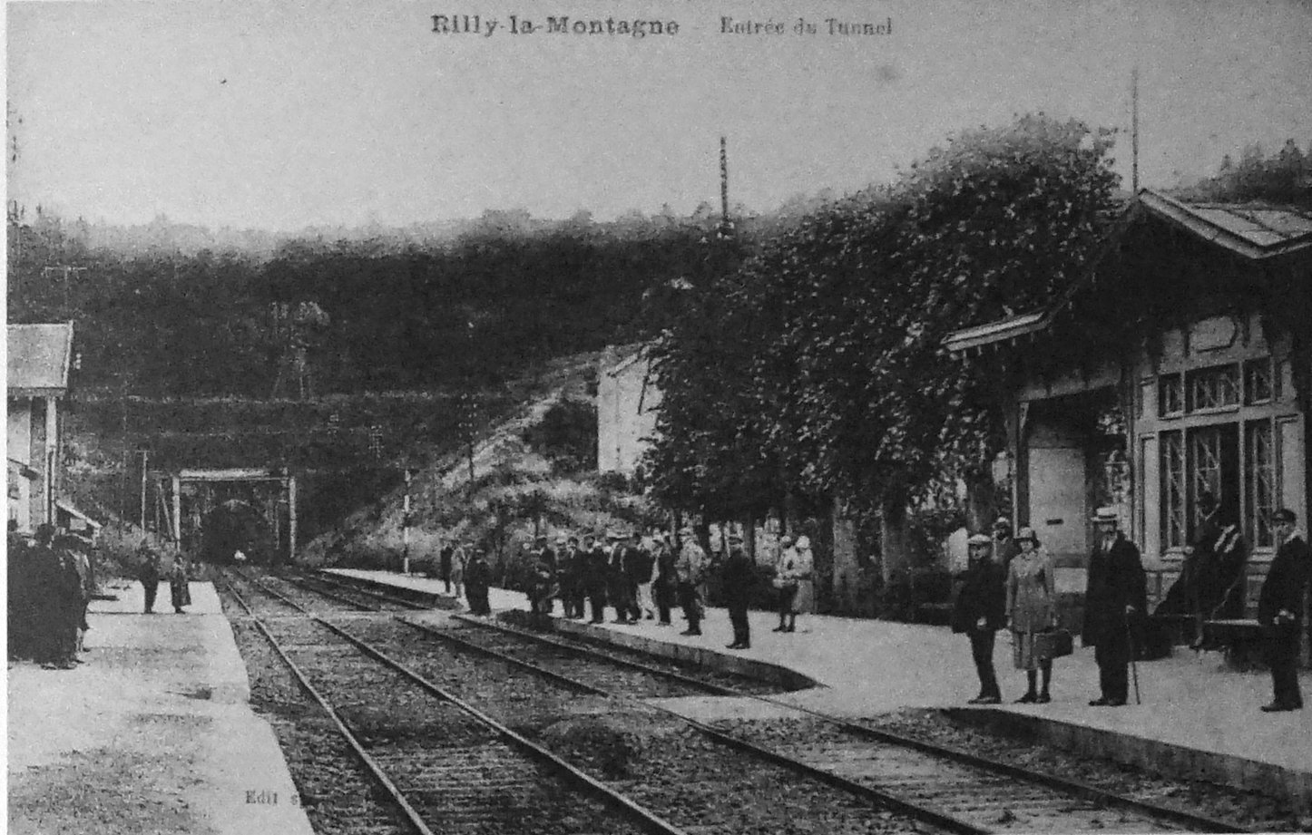 sur une vue ancienne.